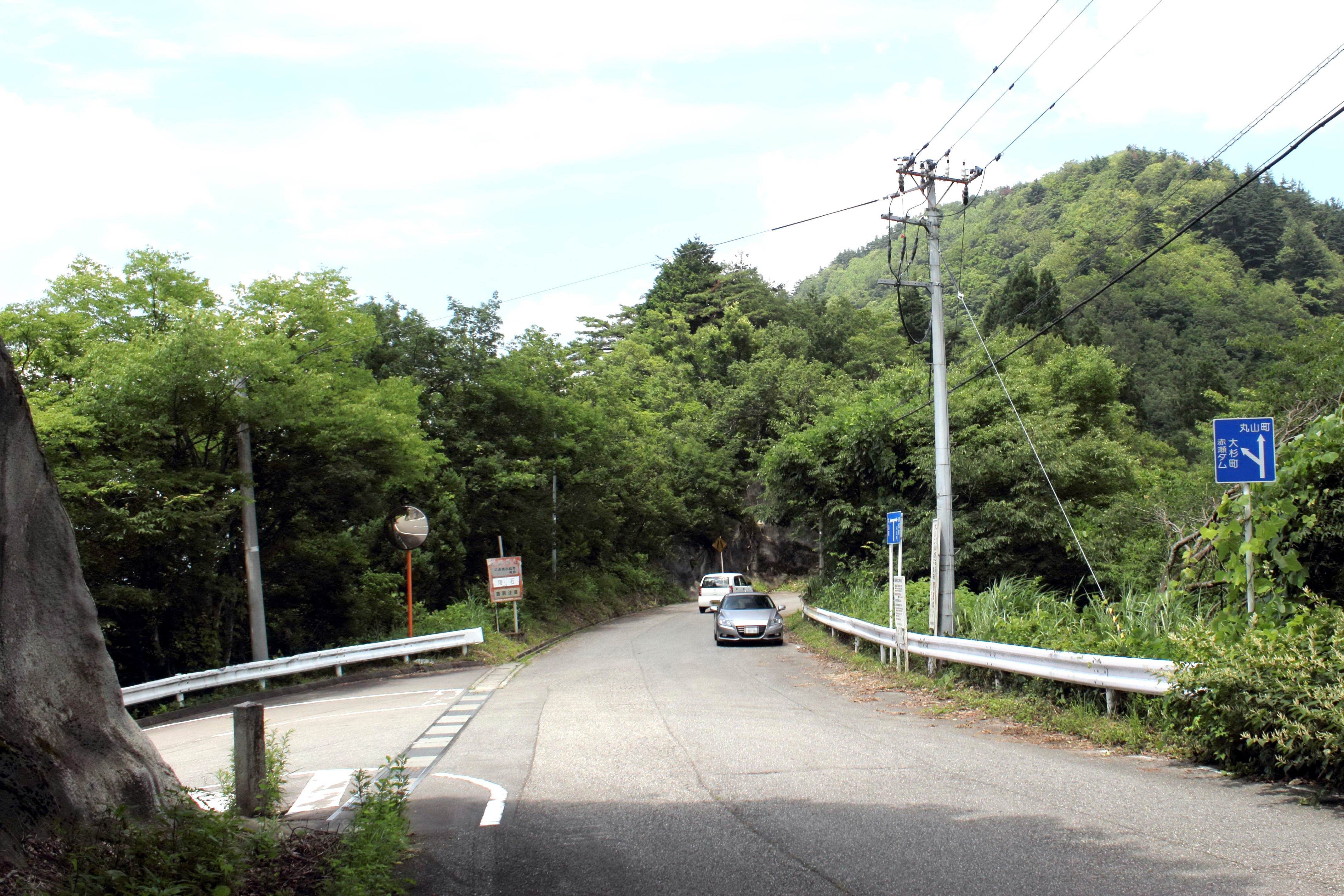 牛ヶ首峠（石川県小松市）